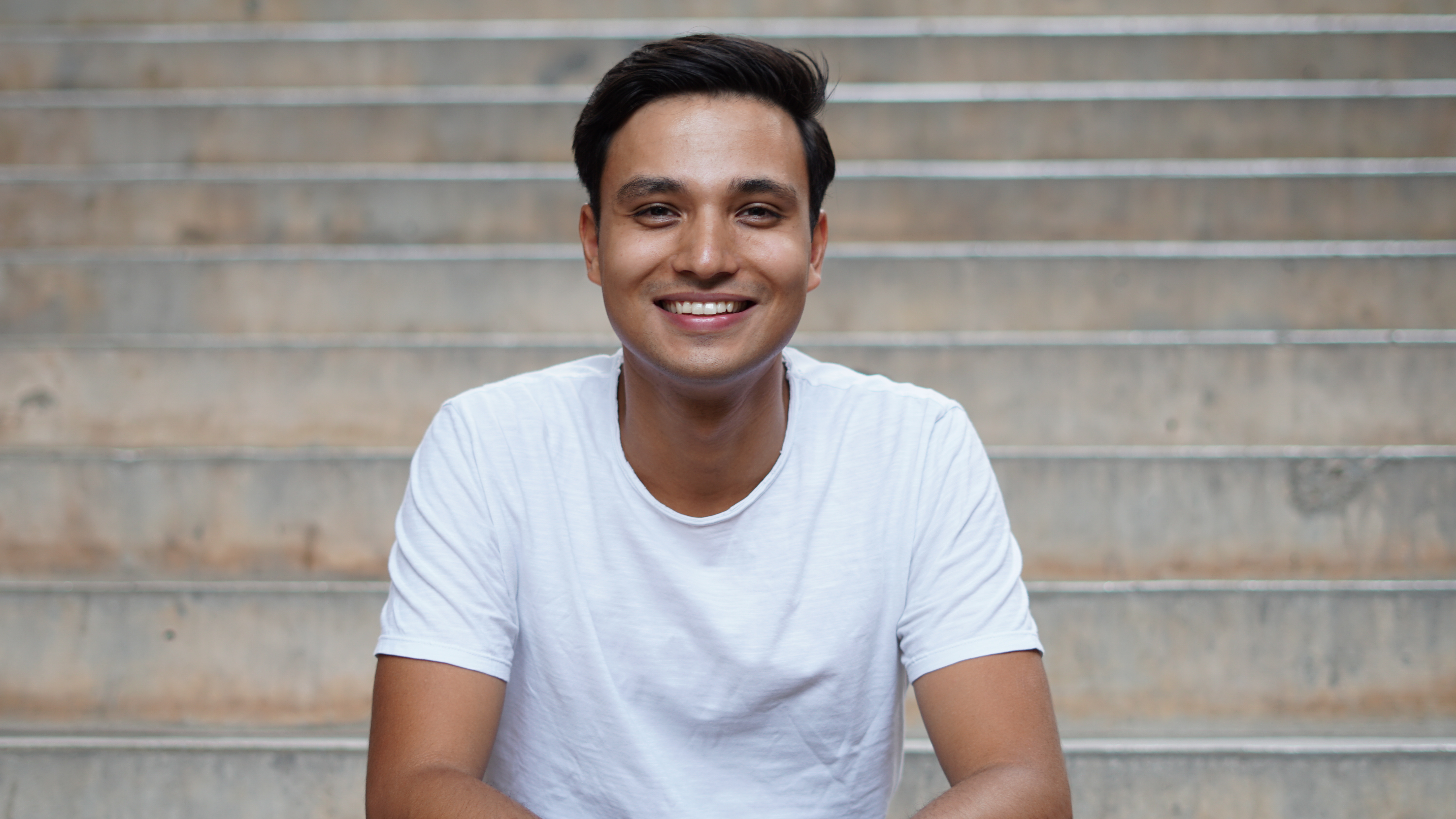 Yannick Shetty